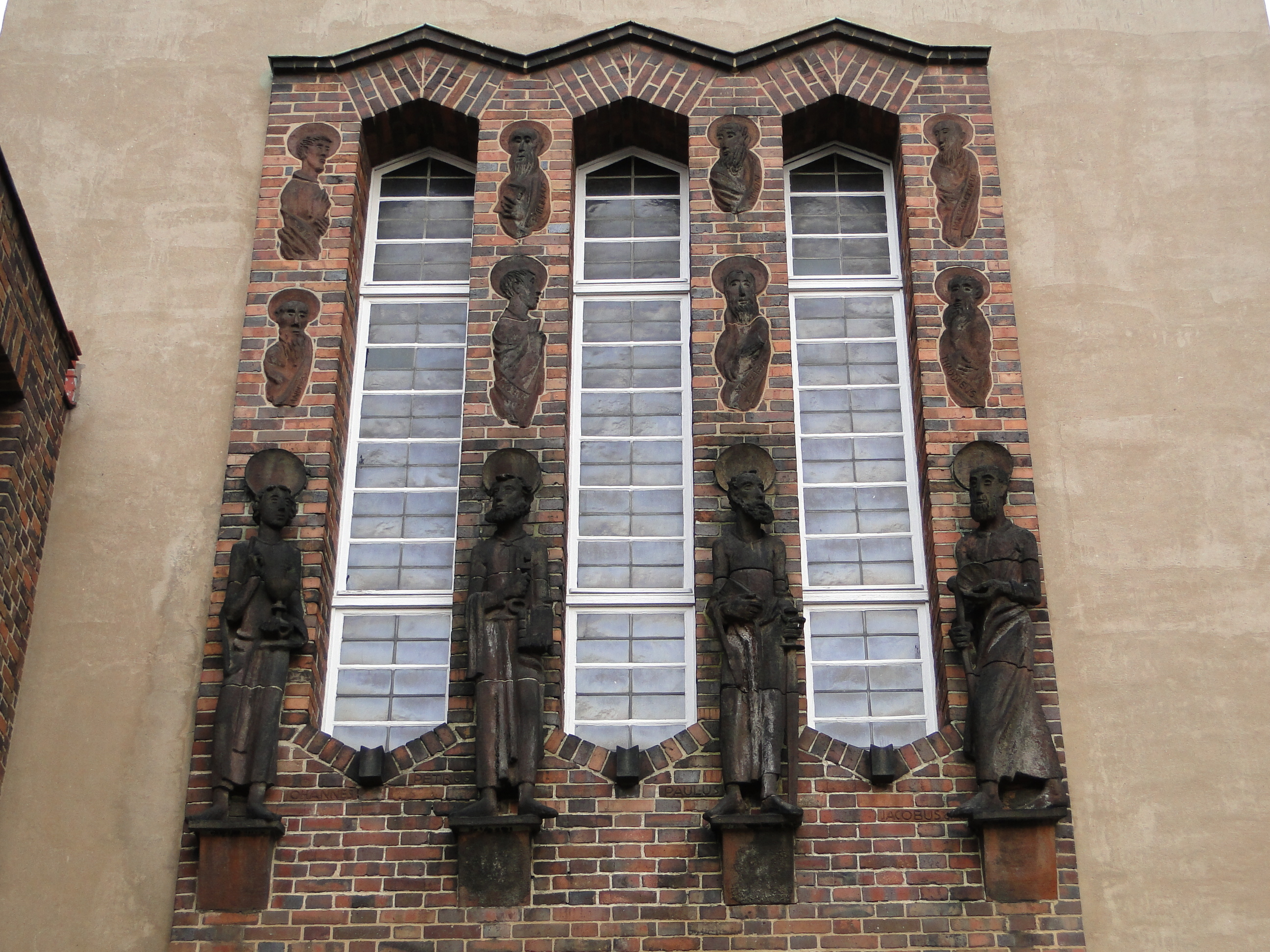 Fassadenschmuck der Apostelkirche in Dresden, geschaffen von Kurt Dämmig